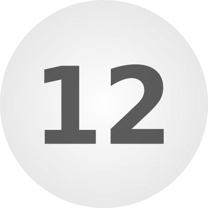 Eine Lottokugel mit der Nummer 12